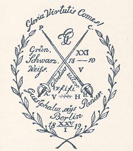 Großes Bundeszeichen Corps Guestphalia Berlin (1810-1821), Zeichnung älter als 1821, Rechte abgelaufen Großes Bundeszeichen des Corps Guestphalia Berlin (bestand von 1810 bis 1821, berühmtestes Mitglied war der Dichter Theodor Körner, aktiv 1811, gefallen in den Befreiungskriegen gegen Napoleon 1813), zeigt den Lorbeerkranz mit zwei gekreuzten Glockenschlägern, an Klingenspitzen und Griffen die Buchstaben "P.A.C.H." ("pectus amico, cuspis hosti"), im oberen Feld den Zirkel, rechts das Gründungsdatum XXI.V.1810, unten den Wappenspruch "Gladius ultor" und den abgekürzten Wappenspruch v.f.i.f.i. ("vivant fratres intimo foedere iuncti") sowie den "Punktbruch" mit drei Punkten oben für die drei Chargierten und vier Punkten unten für die restlichen Gründungsburschen, links und rechts vom Punktbruch die Buchstaben "V" und "H" für "Vivat Haaser" (Huldigung an den Gründer des Corps, der bereits in Göttingen und Jena einer Guestphalia angehört hat), im linken Feld die Farben "Grün.Schwarz.Weiss", das Datum ganz unten (XXV.I.1819) ist ein Rekonstitutionsdatum).